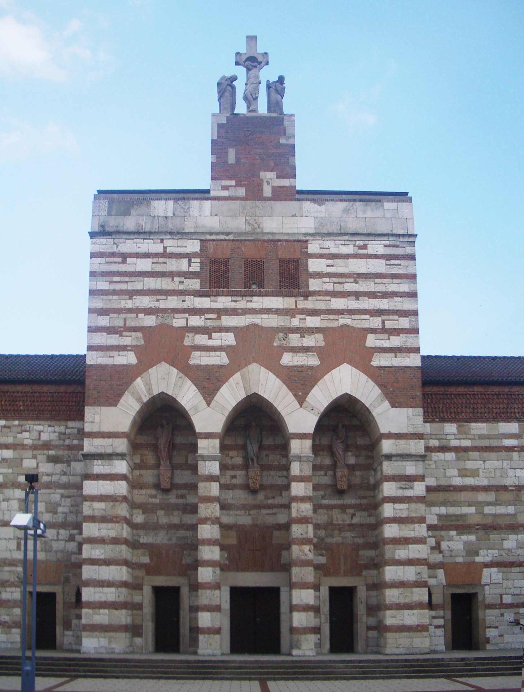 Kirche St. Johann Baptist, Neu-Ulm Architekt: Dominikus Böhm